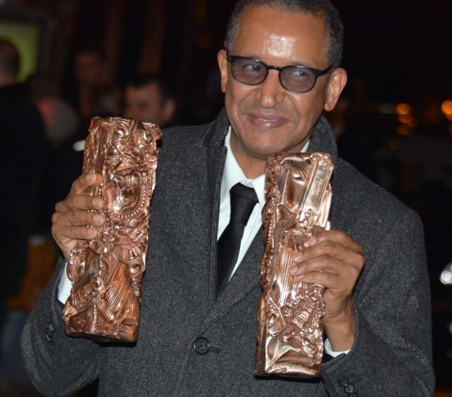 Abderrahmane Sissako à la cérémonie des César